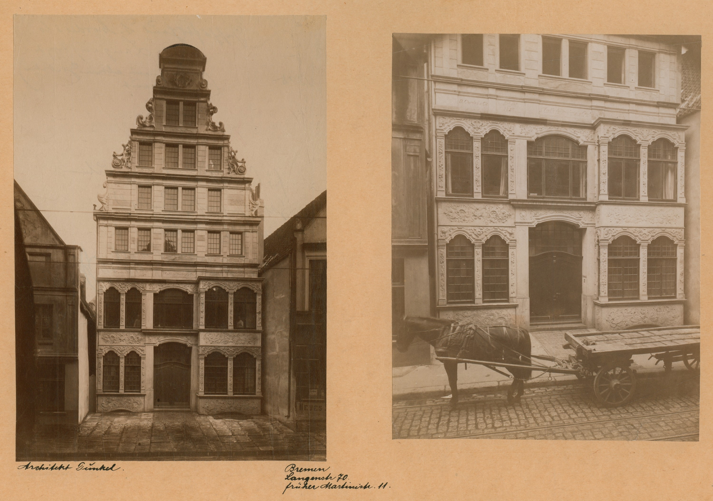 Haus Lagenstraße 70 (um 1900, zerstört im 2WK), Zweitnutzung der Rokokofassade, die heute Teil des Hauses Martinistraße 27 in Bremen istDas abgebildete Objekt ist ein geschütztes Kulturdenkmal in der Freien Hansestadt Bremen, mit der Nr. 0877 beim Landesamt für Denkmalpflege registriert.